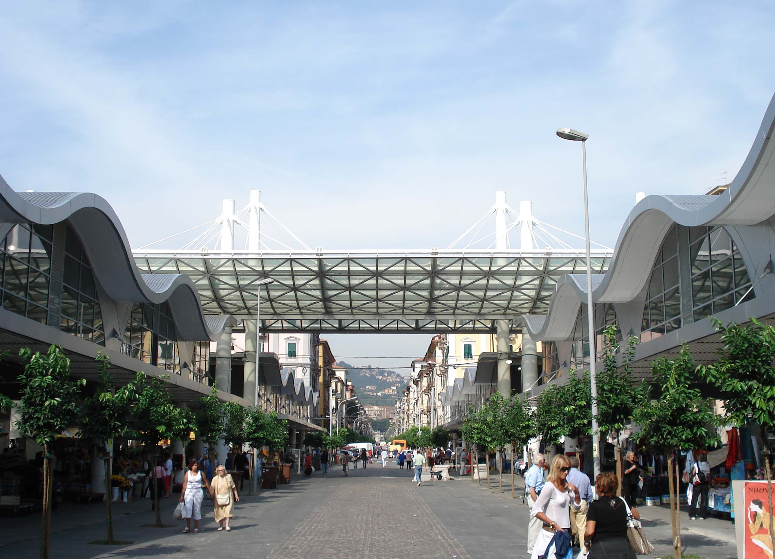 Piazza del Mercato: Progetto Architetti Gaspare Chiodo e Roberto Grossi; Ingegnere Claudio Testa- La Spezia- Italia